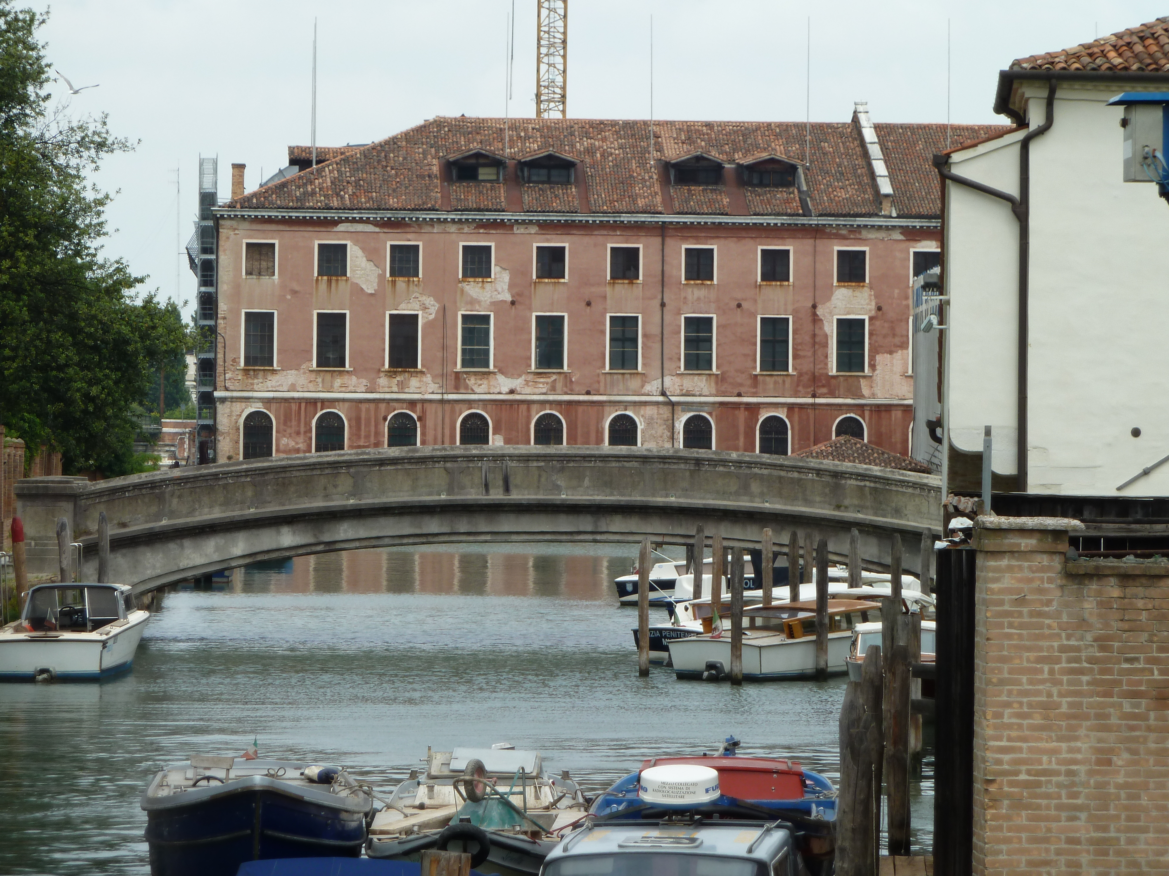 Rio di Santa Marta (Venice)